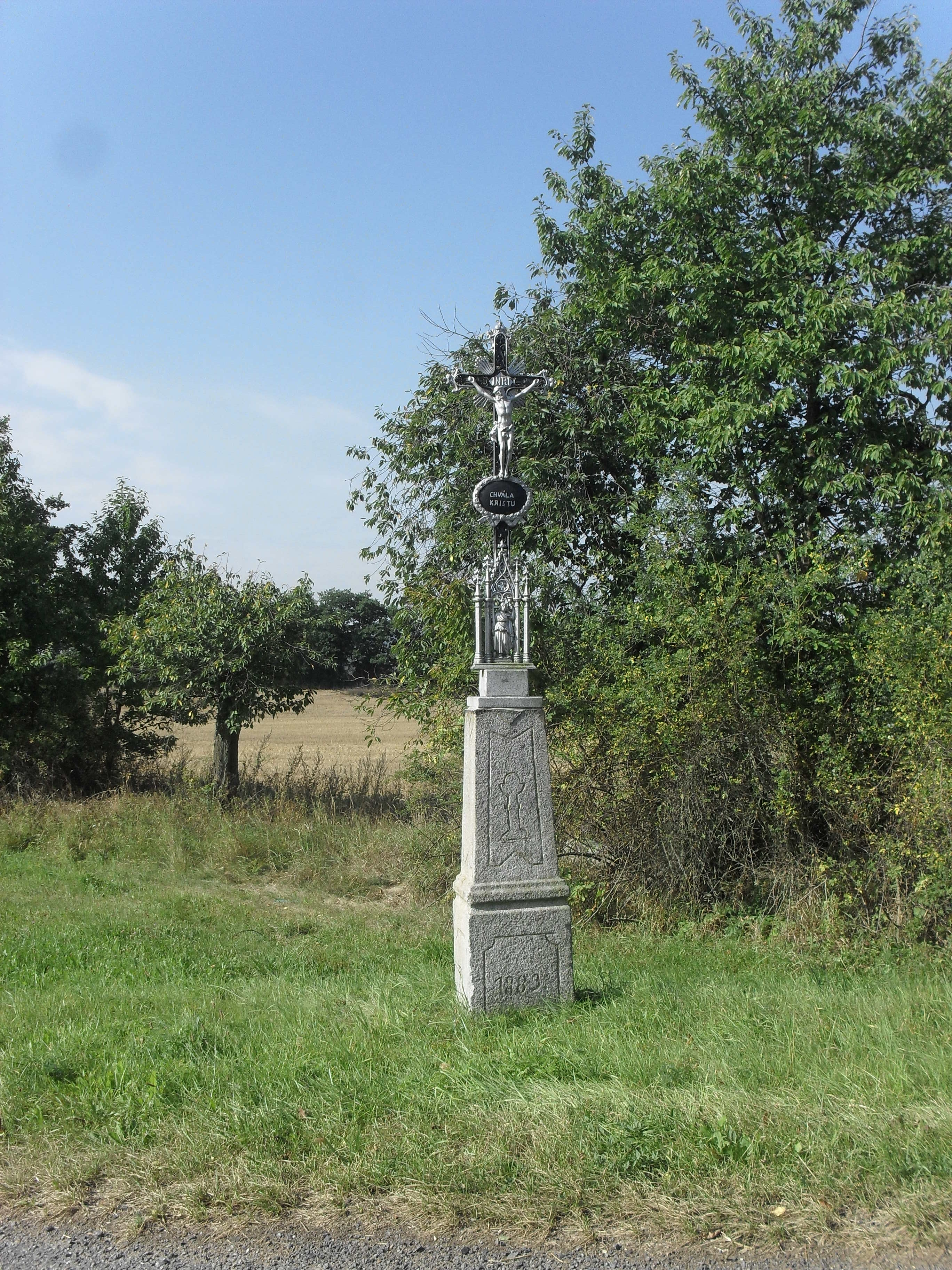 Fotografie pořízena v obci Maňovice.